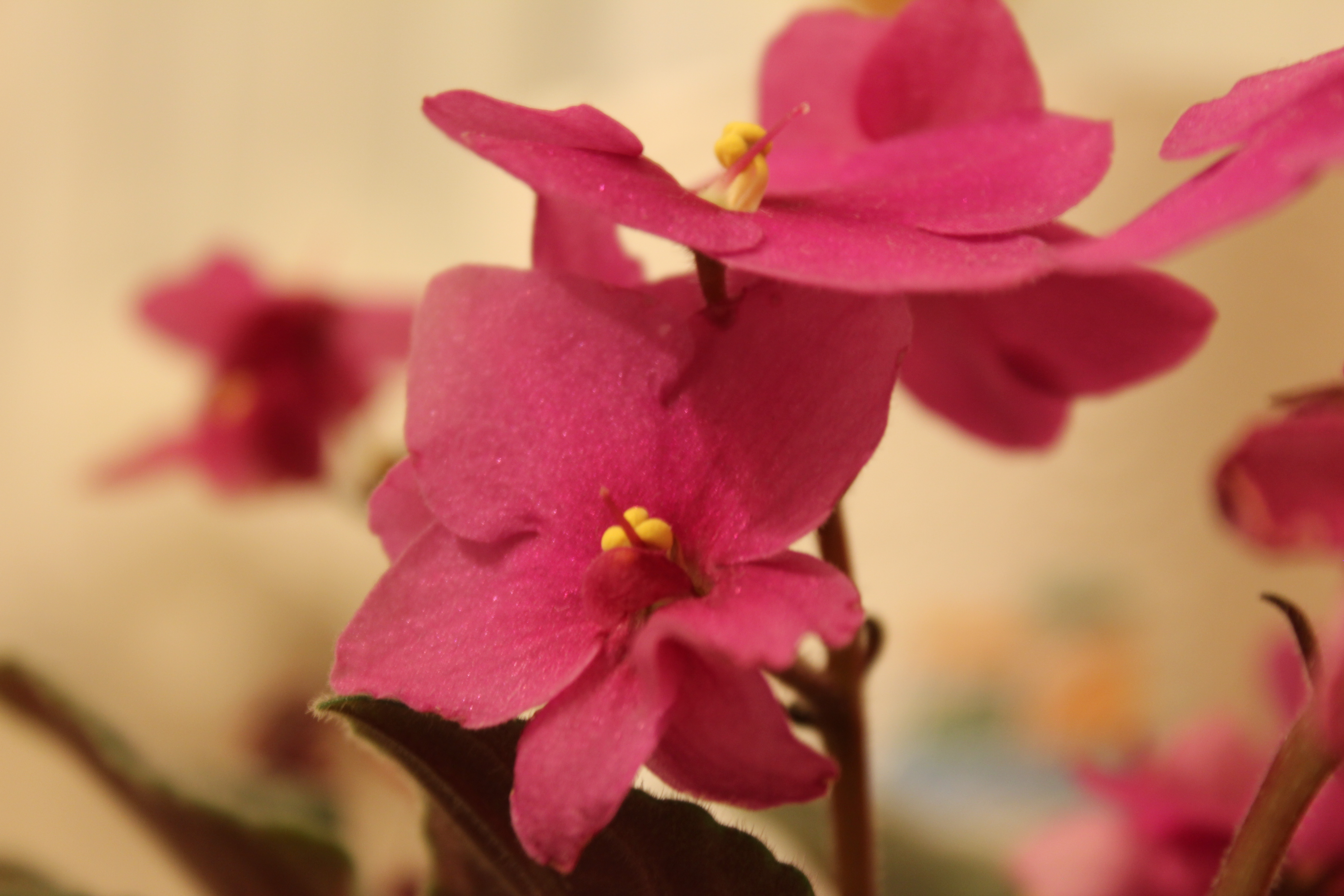 Description Vue rapproché d'une fleur de Saintpaulia (cultivars) Date04/01/2012SourceTravail & Réalisation PersonnelleAuthorTeeppix Catégorie:Botanique Vue rapproché d'une fleur de Saintpaulia (cultivars)